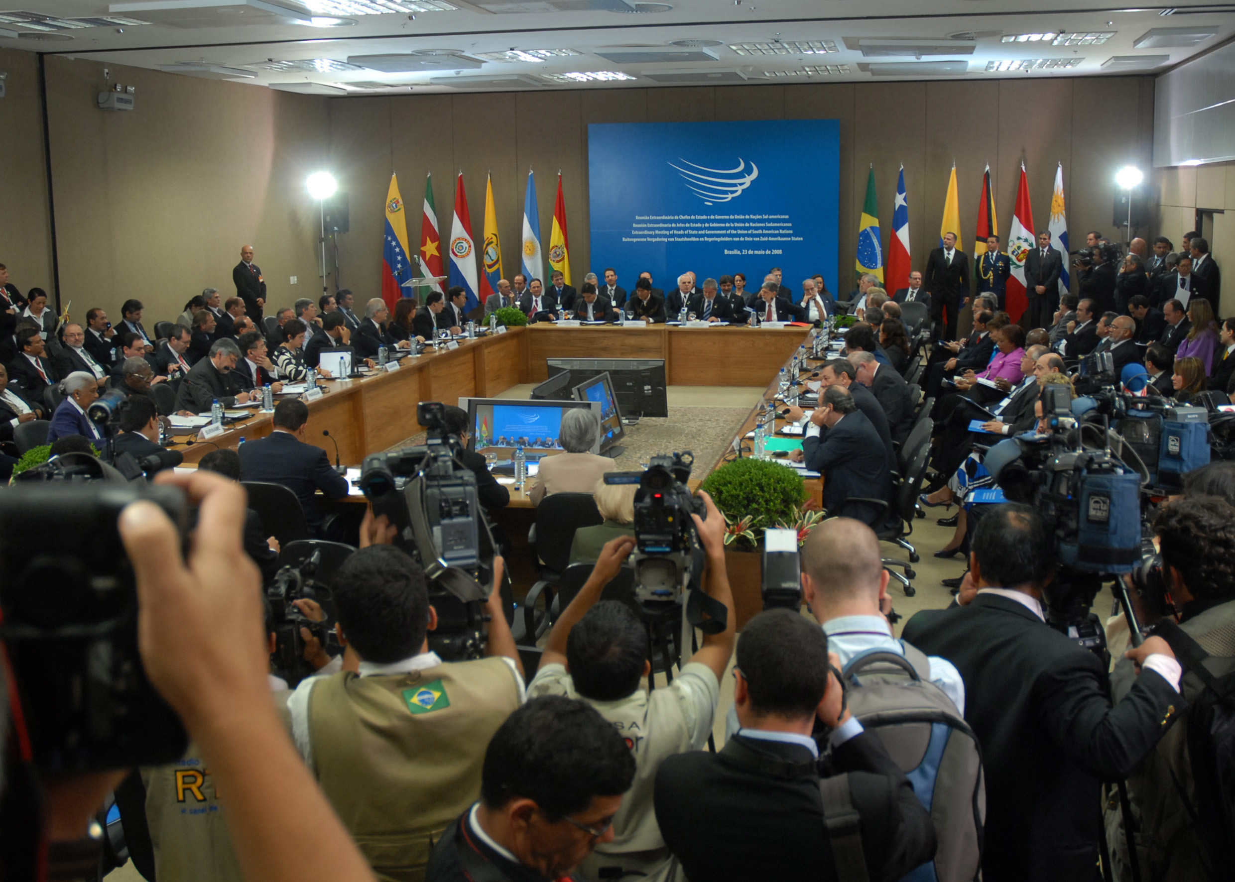 Brasília - Presidentes reúnem-se durante reunião extraordinária da União de Nações Sul-Americanas (Unasul). O encontro servirá para a assinatura do tratado de constituição da organização, que existe apenas informalmente.